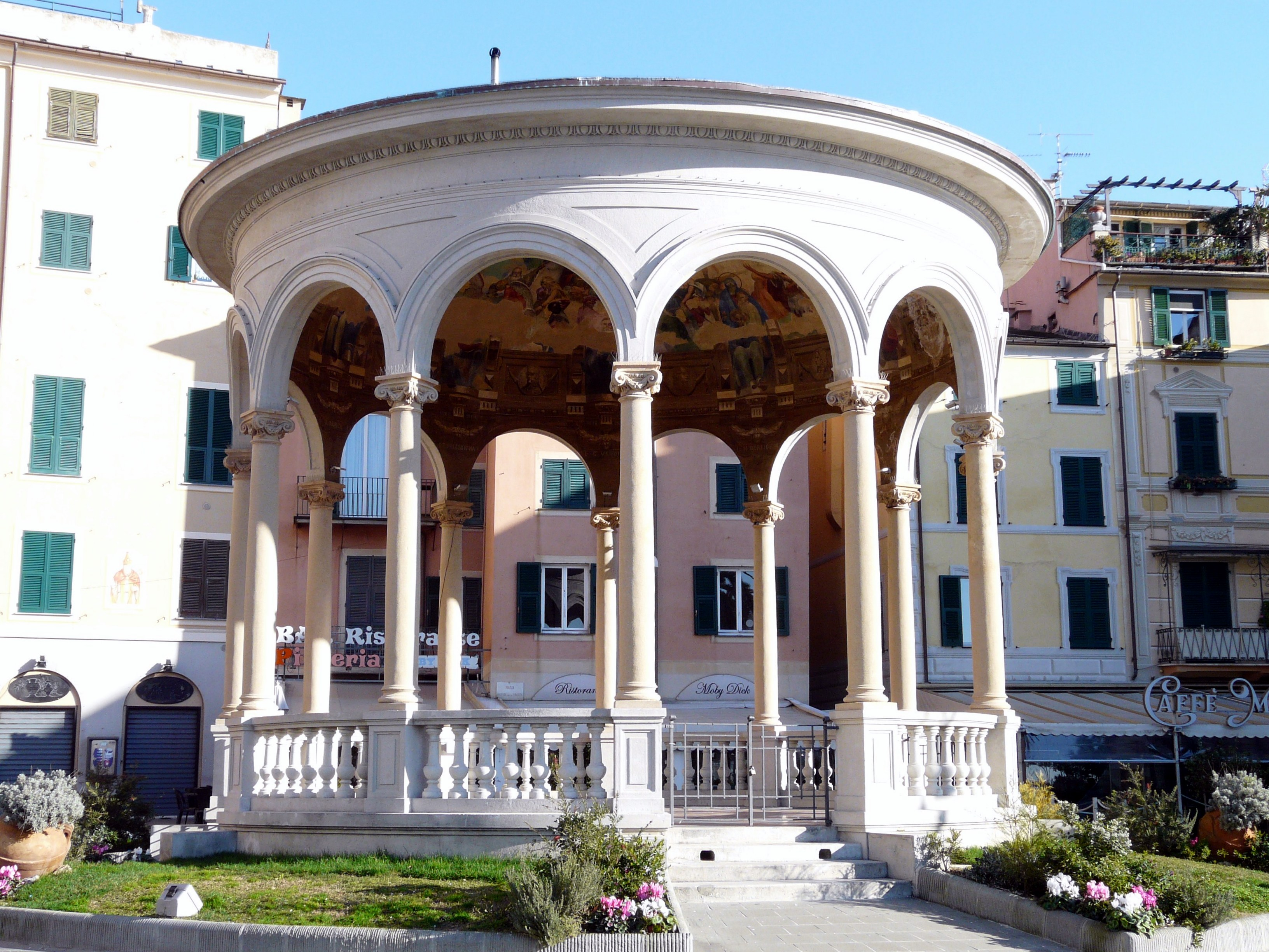 Il chiosco della musica, Rapallo, Liguria, Italia